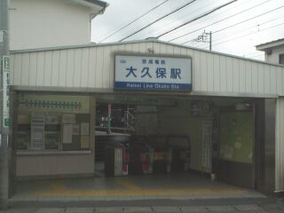 京成大久保駅成田方面 投稿者が撮影 Category:京成電鉄の画像 Category:鉄道駅画像